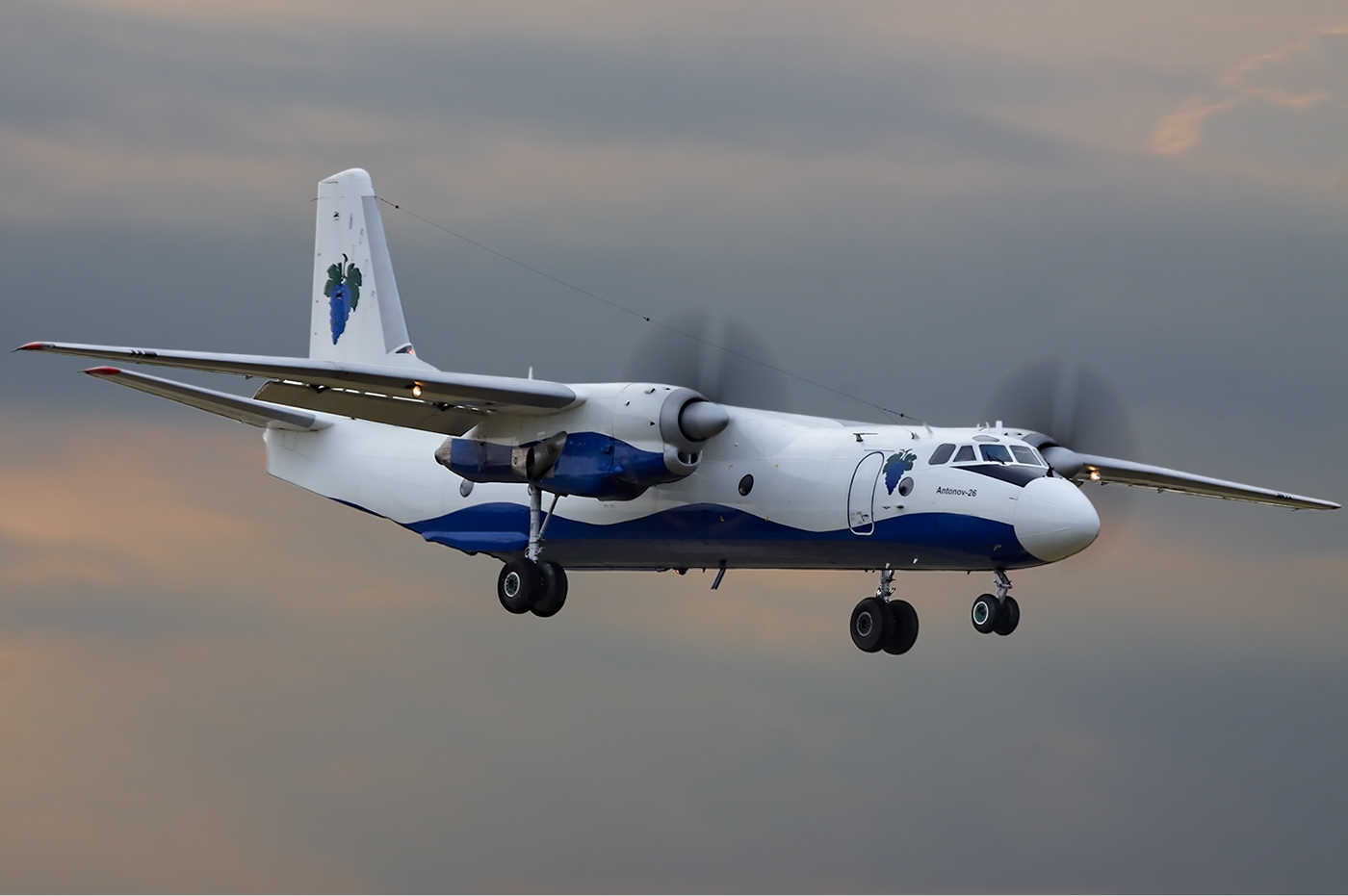 Asia Airways Antonov An-26